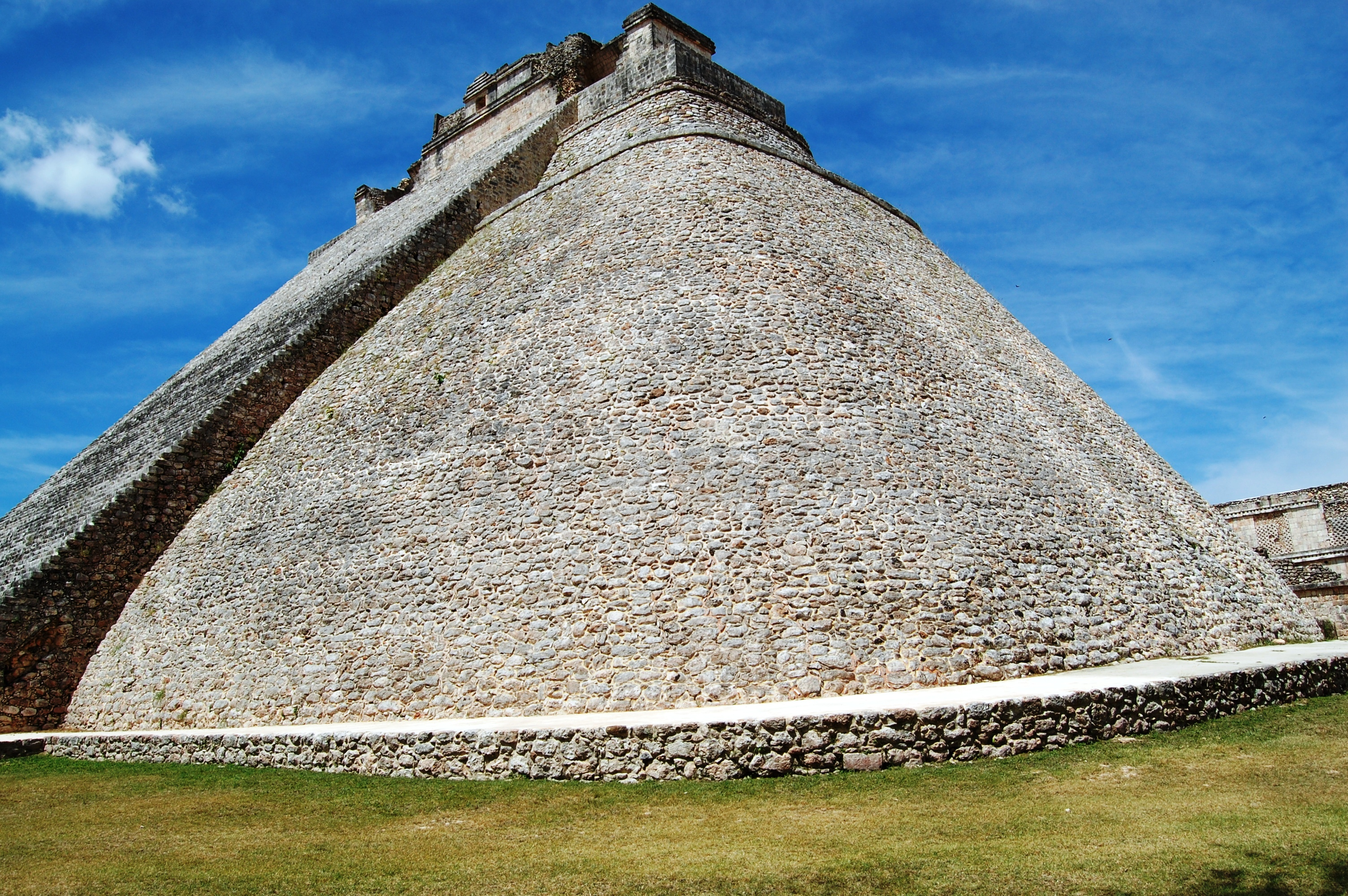 Uxmal, Mexico Piramide del Adivino (back)